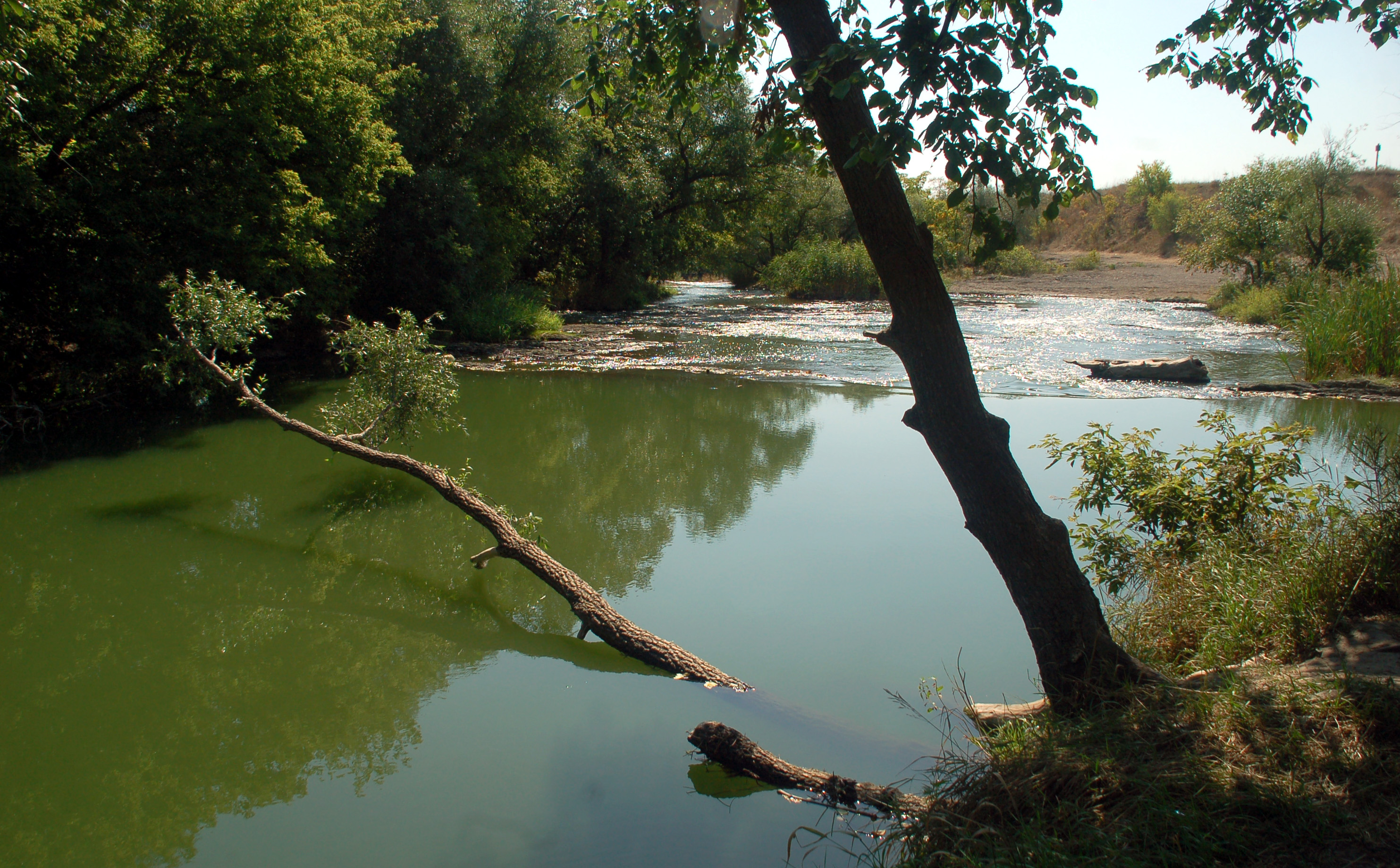 Ландшафтный парк "Донеций Кряж", р.Крынка.